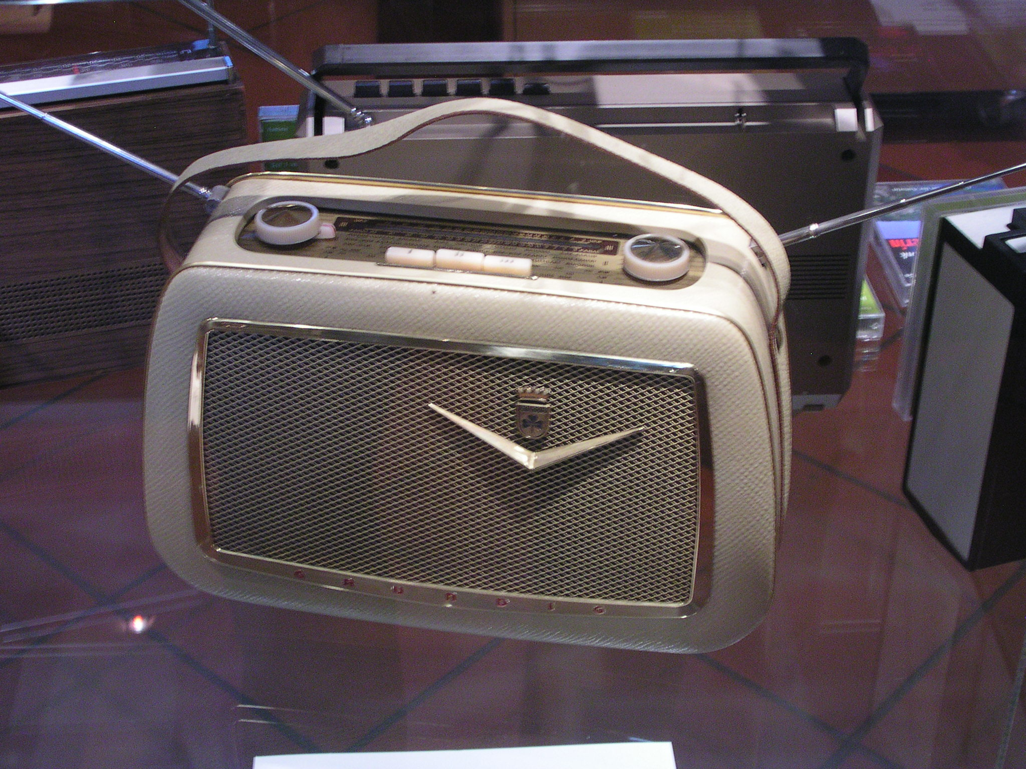 Grundig Teddyboy 58, Baujahr 1957